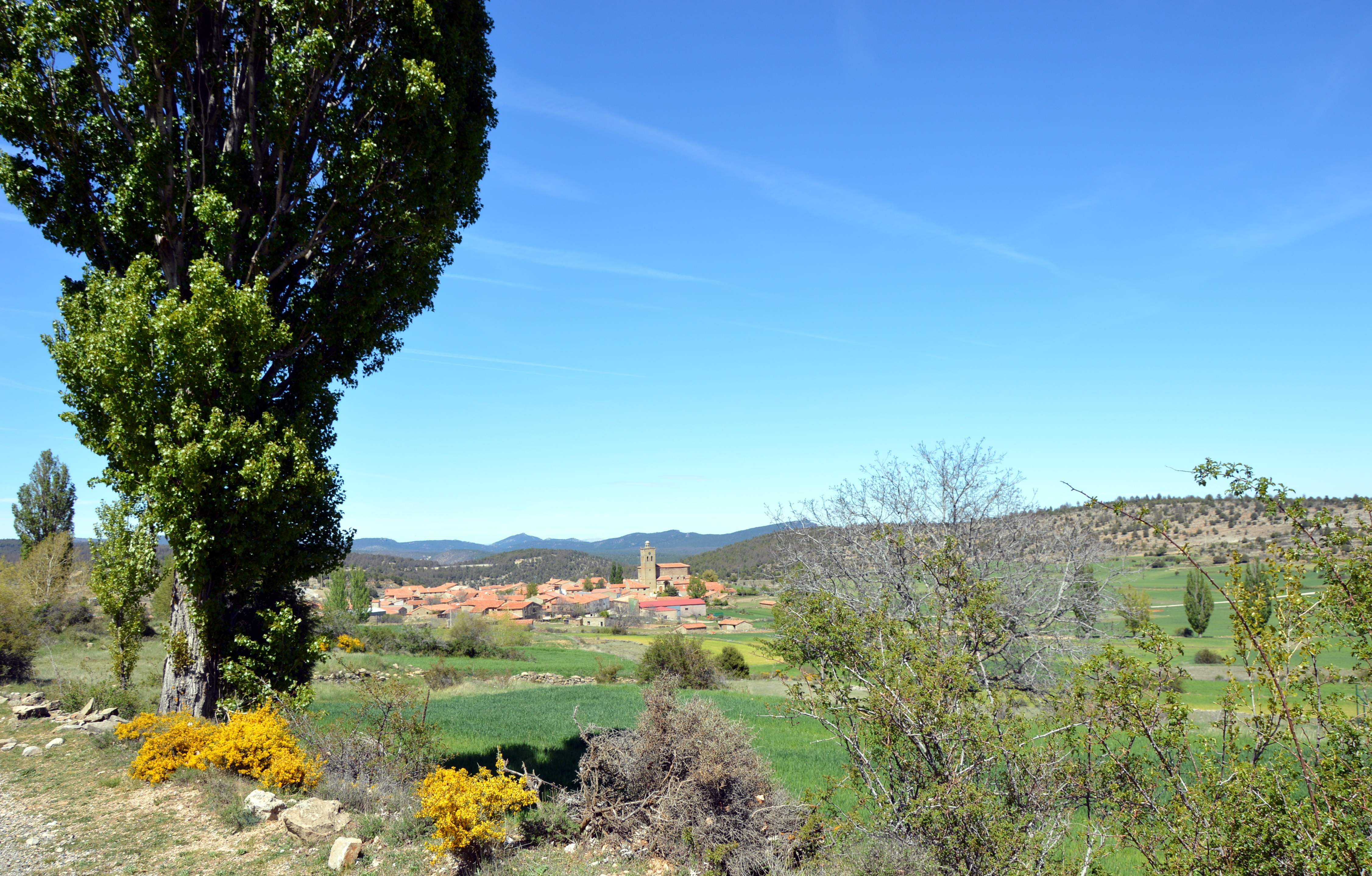 Vista general (meridional) de Jabaloyas (Teruel), desde la pista de Alobras (2017).